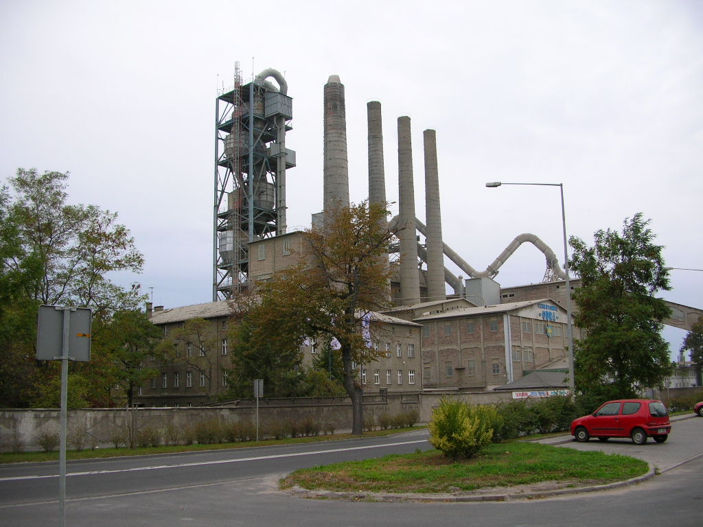 Opole - Cementownia Odra ostatnia z działających Autor - Bartek Wawraszko ( Bast )